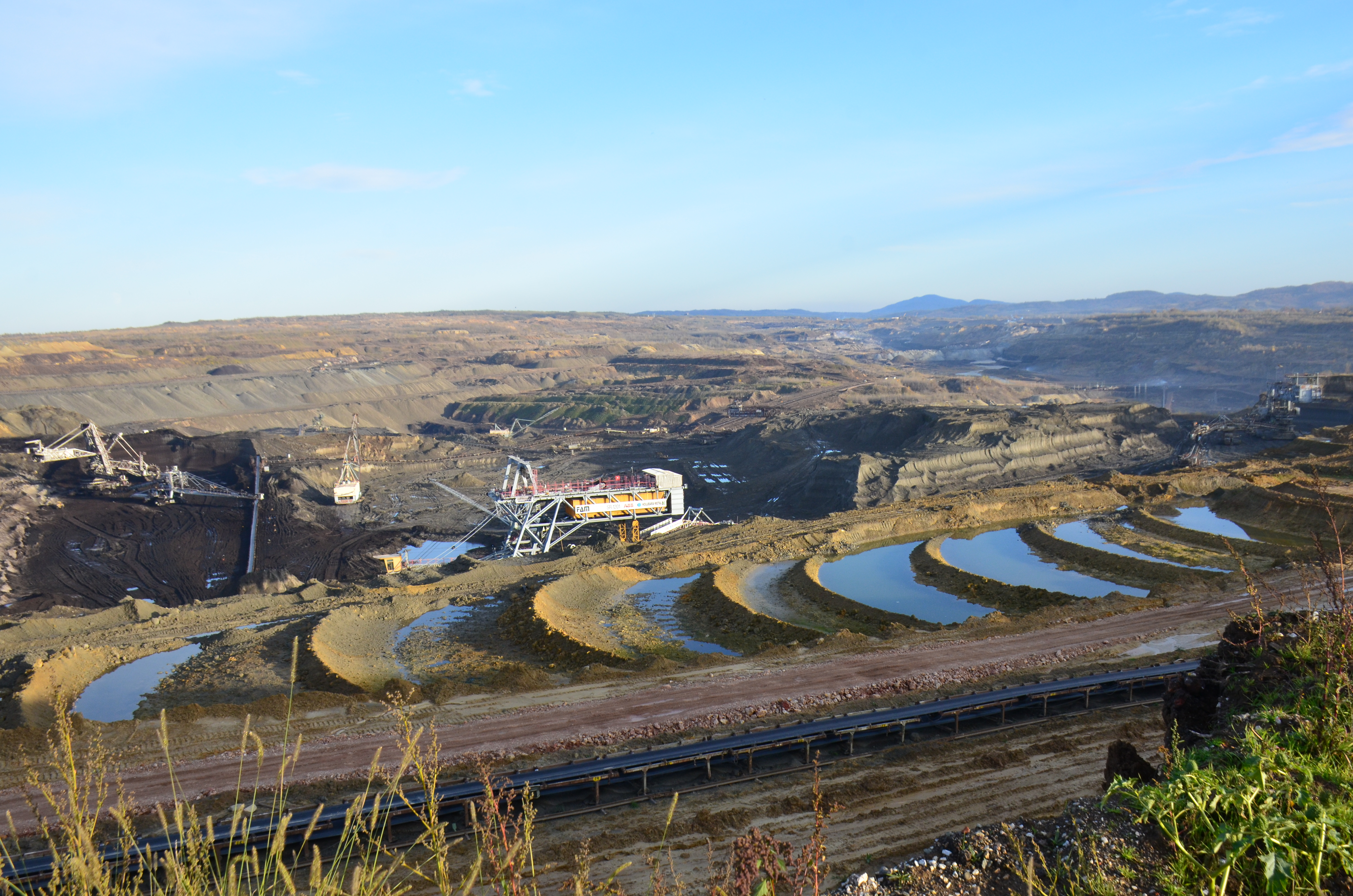 Српски (ћирилица): Запис - храст у селу, село Вреоци, Општина Лазаревац, Град Београд, Србија